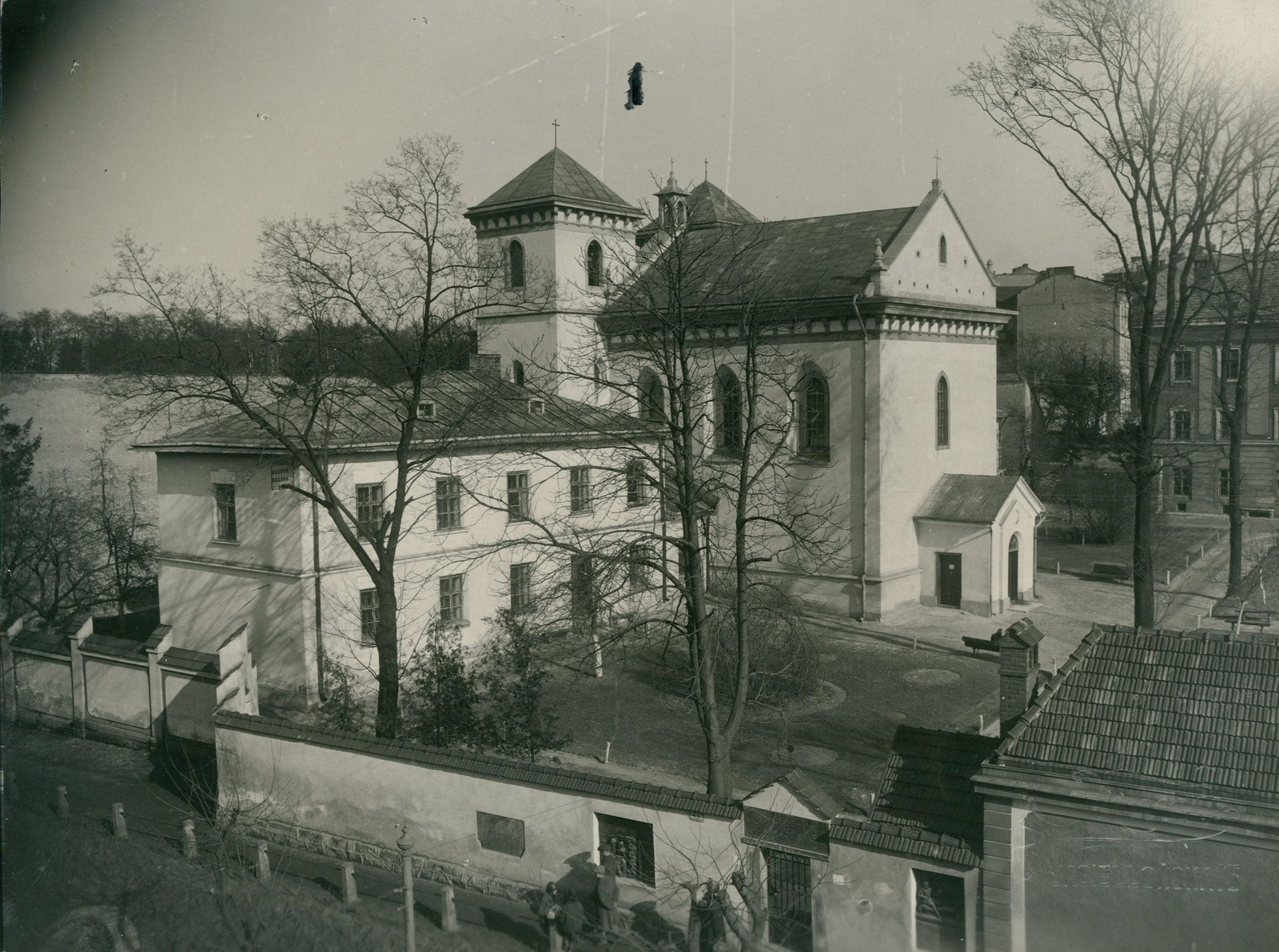 Костел святого Лазаря, в котором располагался госпиталь Location: Ukraine, Lviv Title